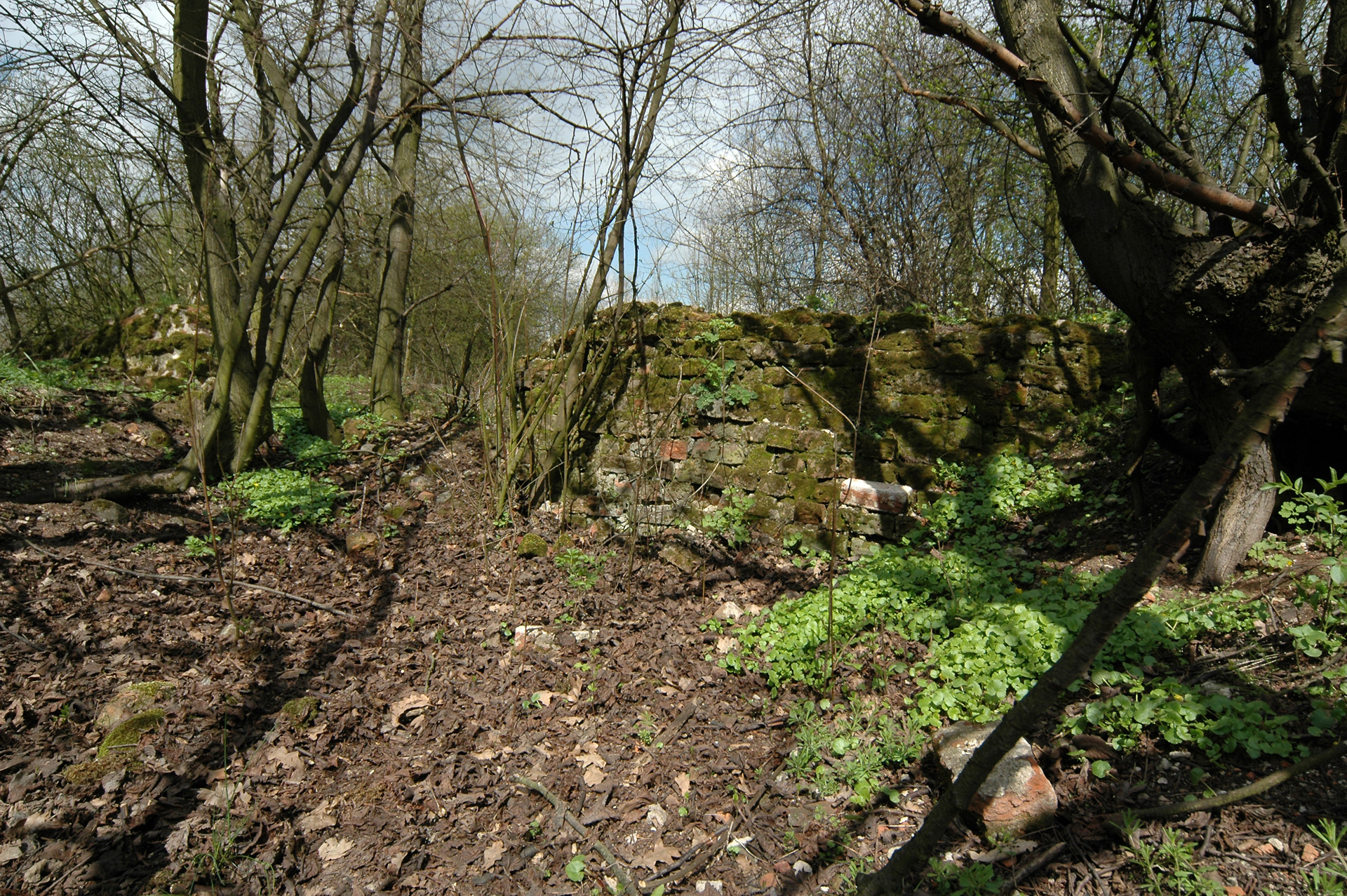 ruiny zamku, ok. poł. XIII Wielka Nieszawka, Gmina Wielka Nieszawka